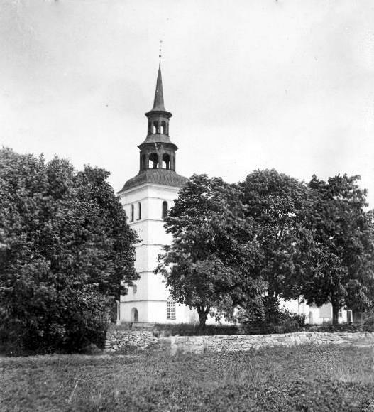 Tornet på Borgviks kyrka, med järnband dolda under plåtbetäckta, enkelt profilerade lister efter åsknedslag 1879 som skadat murverket.